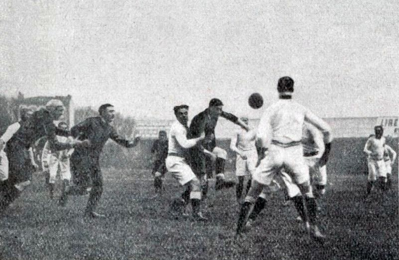 1913 (janvier), derby Stade toulousain (foncés) - Toulouse Olympique (T.O.E.C., blancs, en championnat des Pyrénées - 0-0).